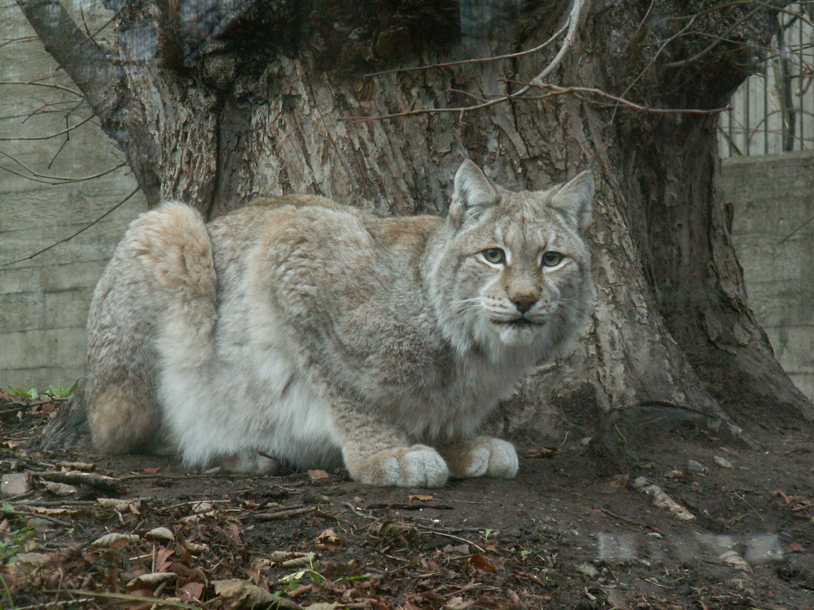 Lynx lynx in Helsinki Zoo Korkeasaari/Finland.